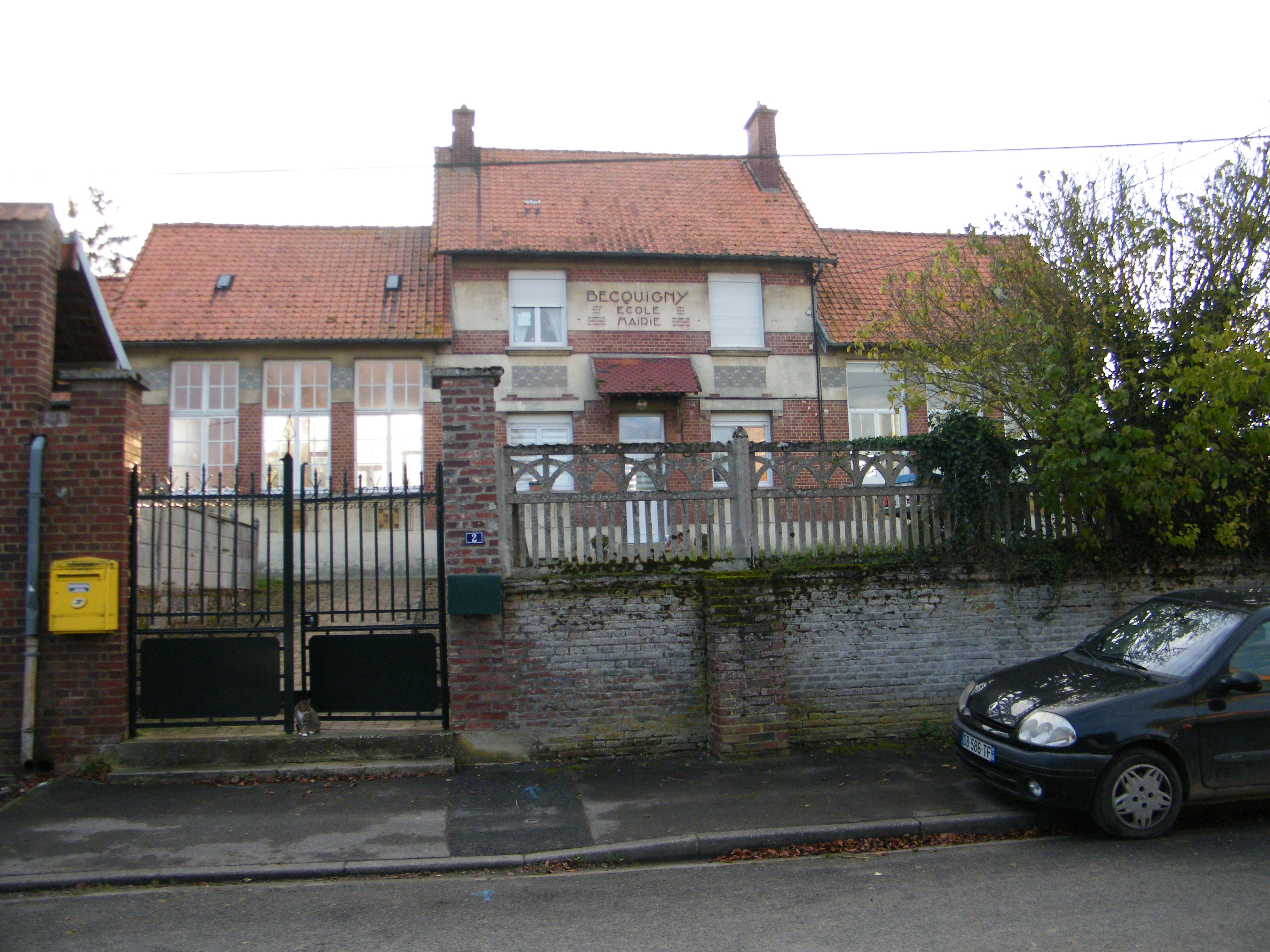 Mairie.